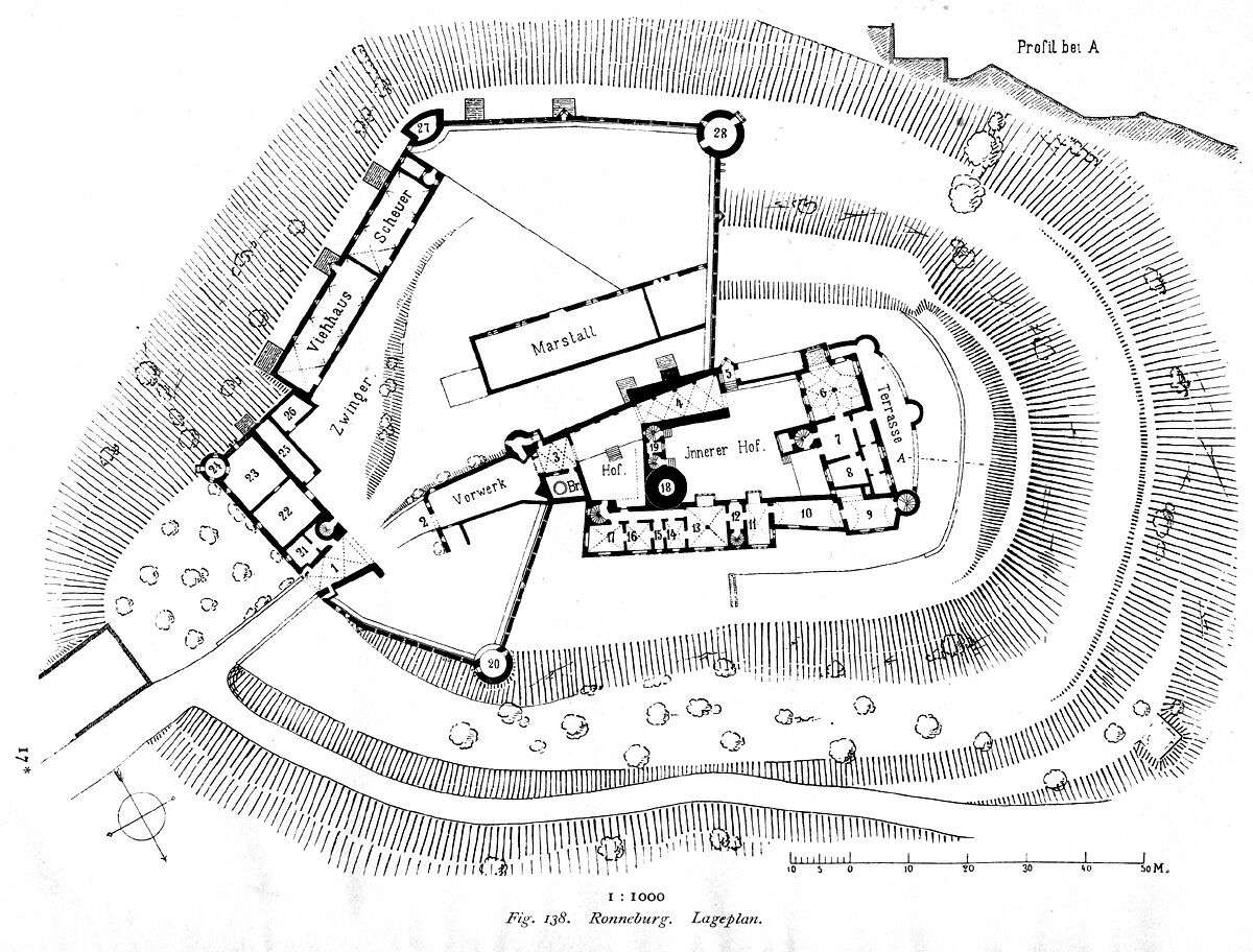 Lageplan der Ronneburg [1890] aus Heinrich Wagner: Kunstdenkmäler im Großherzogtum Hessen. Provinz Oberhessen, Kreis Büdingen. Darmstadt 1890, S. 259.